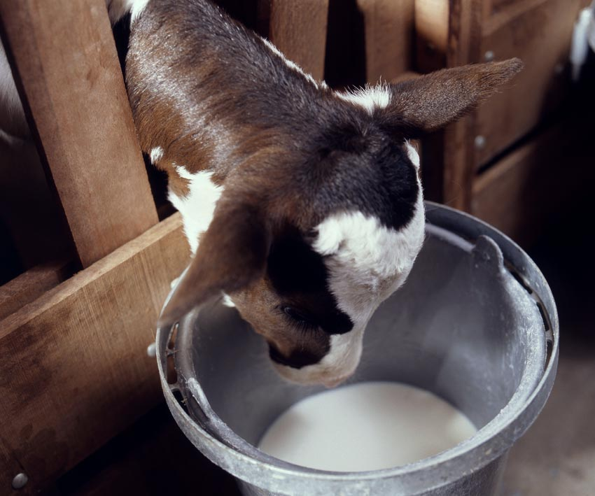 Kalb